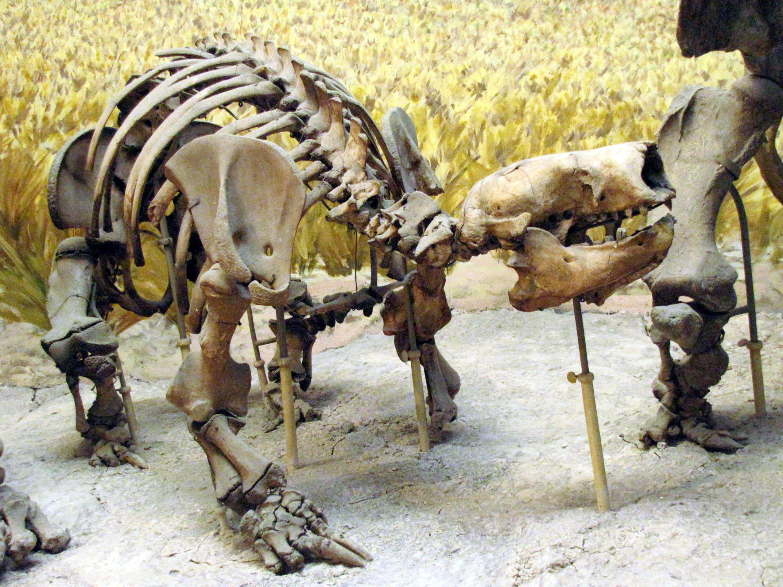 Esqueleto de un Glosoterio juvenil (Glossotherium robustum) Proviene de excavaciones y afloramientos en las mágenes de ríos y arroyos de la Provincia de Buenos Aires. Museo de Ciencias Naturales de La Plata.